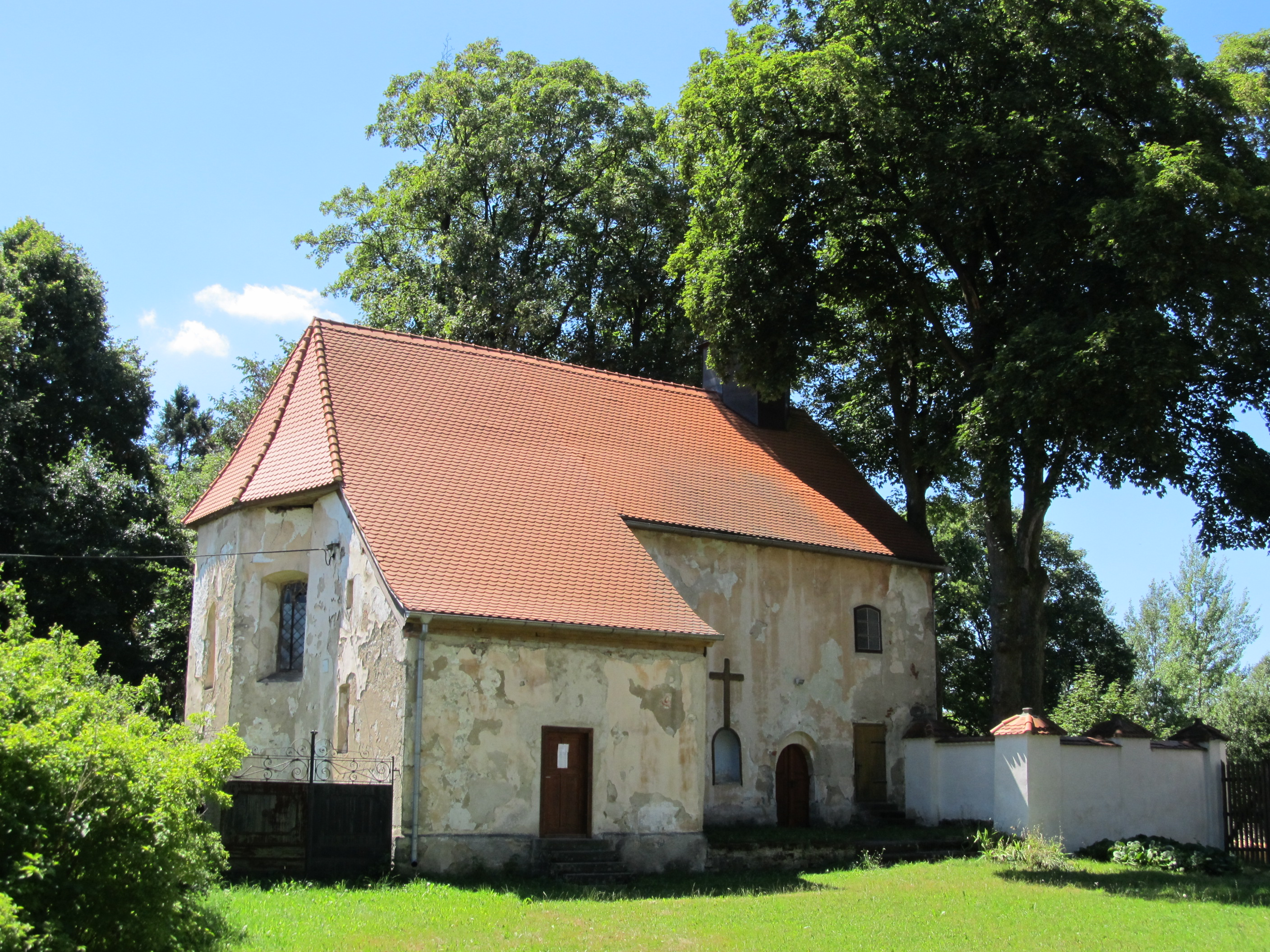 Mlázovy - kostel sv. Jana Křtitele